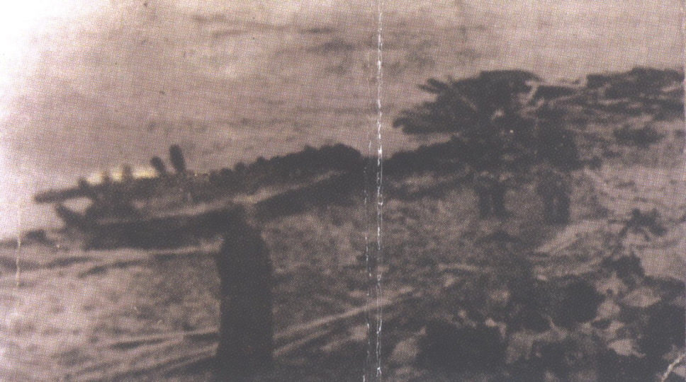 שרידיה הטרופים של ספינת המעפילים סלבדור לחופי העיירה סיליברי בטורקיה